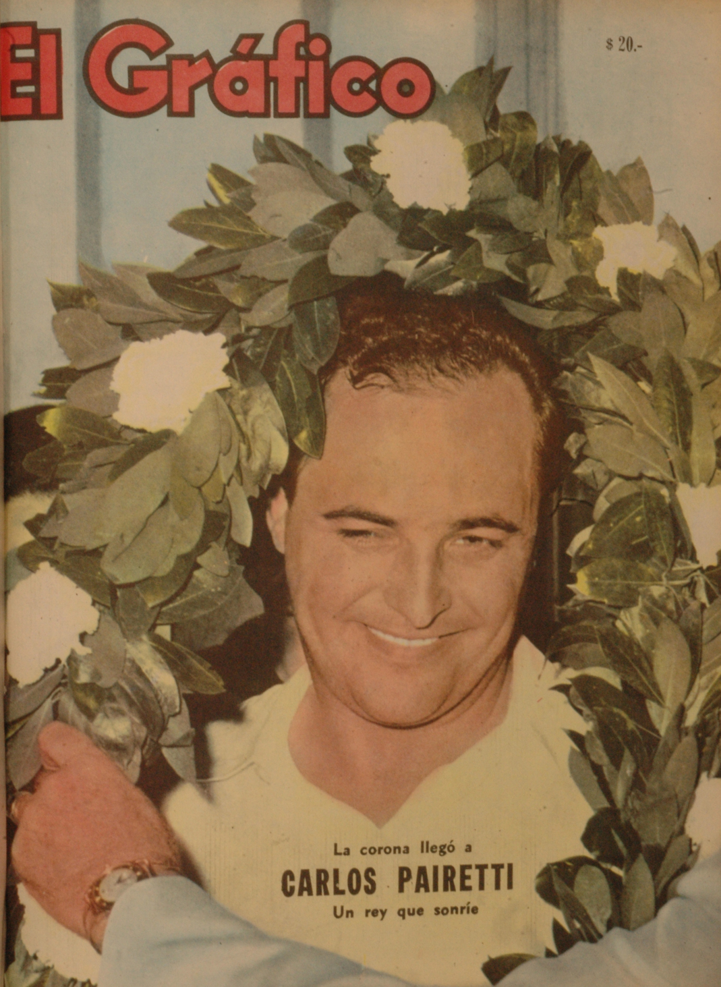 El Grafico del 11 de Diciembre de 1963. Edicion 2305